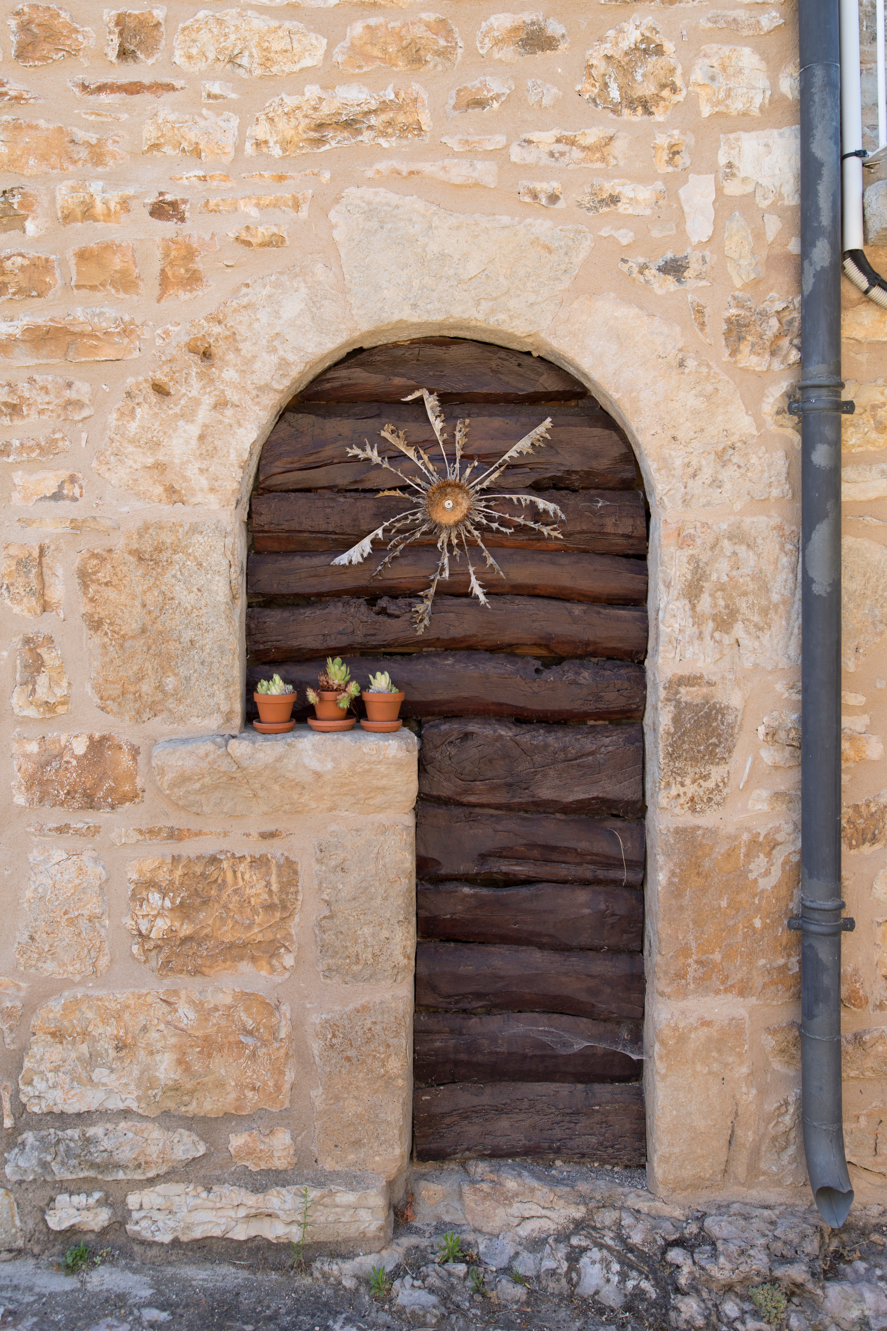 Porte avec carline